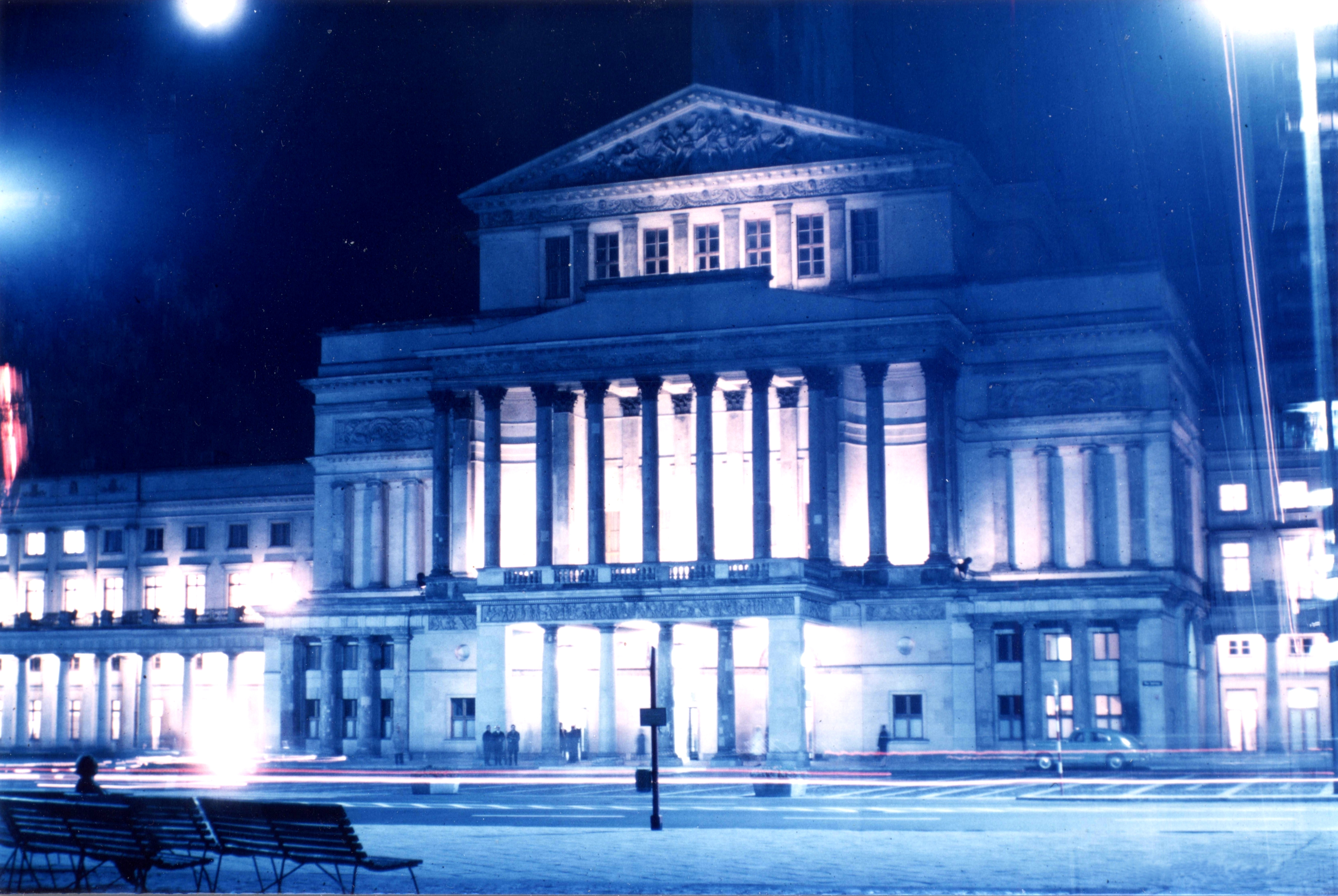 Teatr Wielki w Warszawie